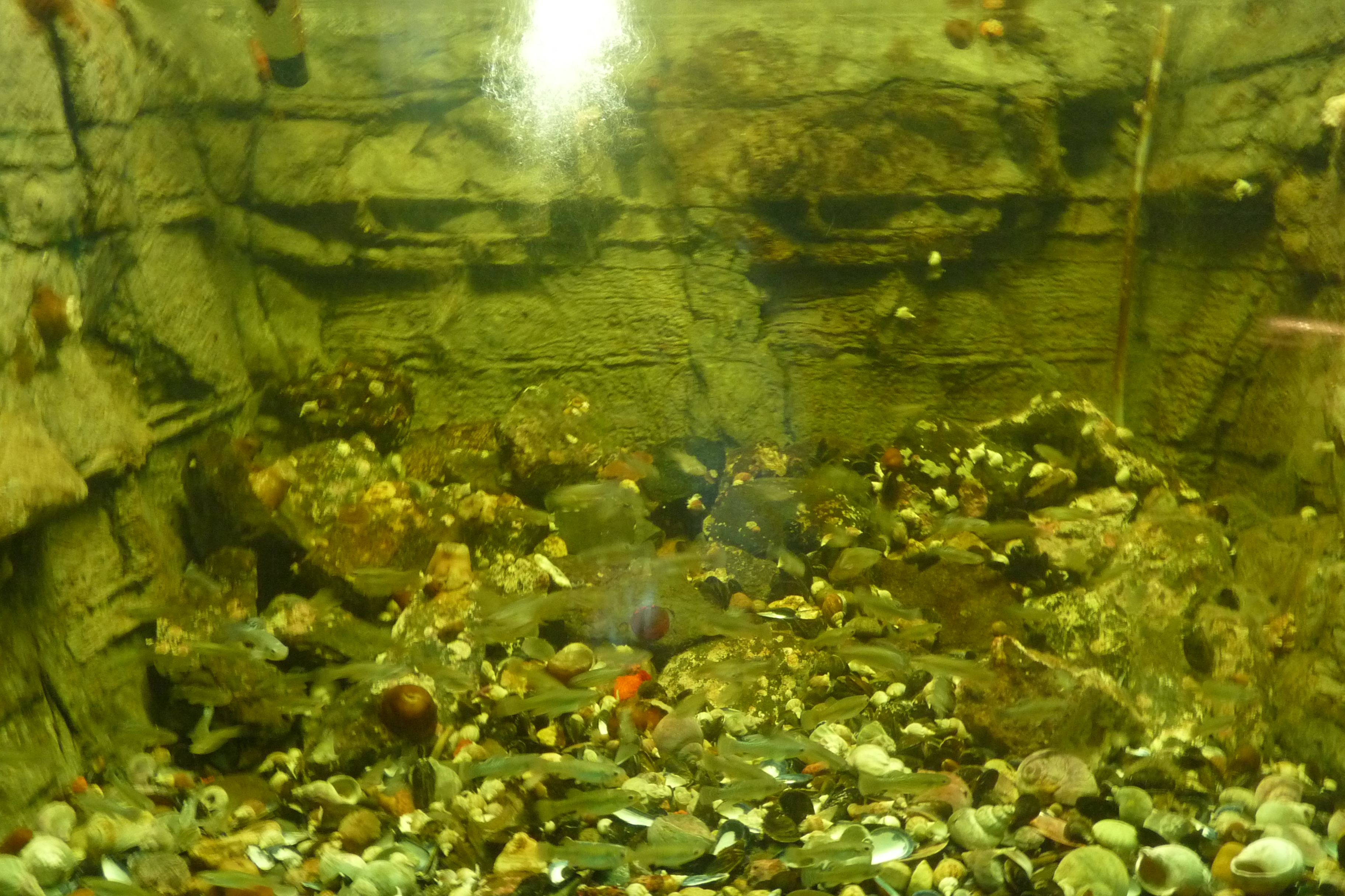 Mollusques et crustacées dans un des aquariums du musée-aquarium Exploramer de Sainte-Anne-des-Monts